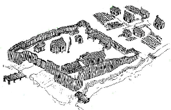 Fort Saint-Joseph sur la rivière Saint-Joseph